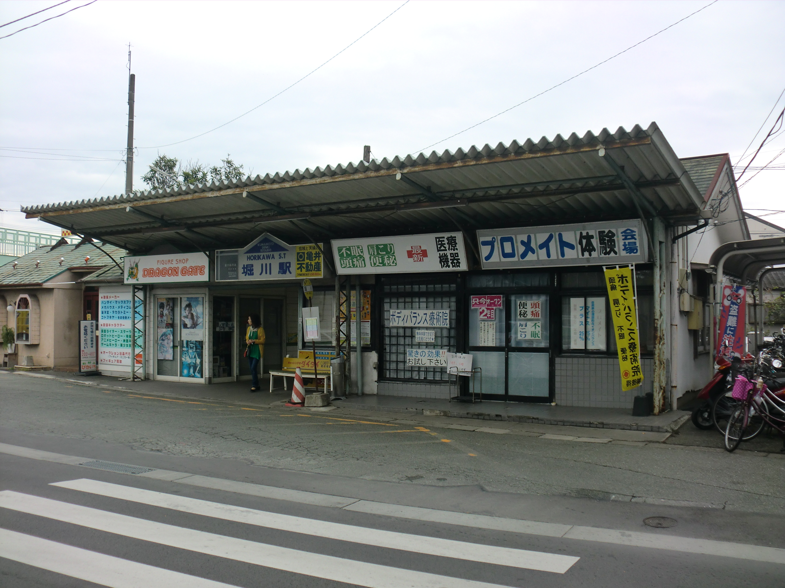 熊本電鉄堀川（ほりかわ）駅